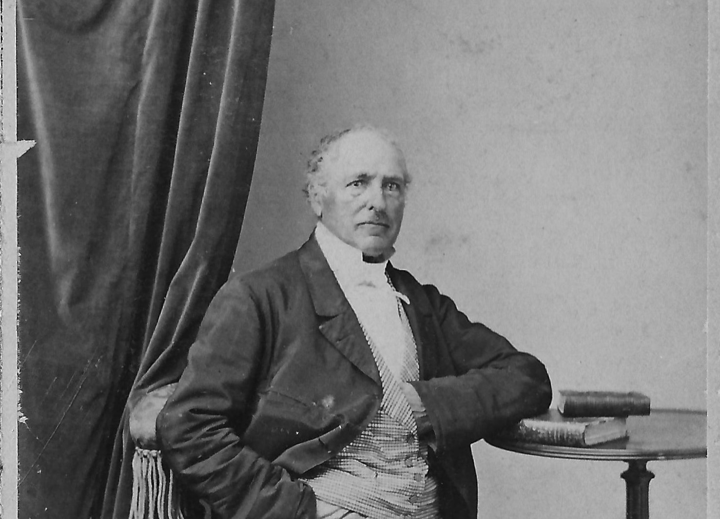 Retrato de Antonio Ulpiano Labat y Larrea por los fotógrafos Chanony, Debas y Maury. Foto perteneciente a mi archivo familiar